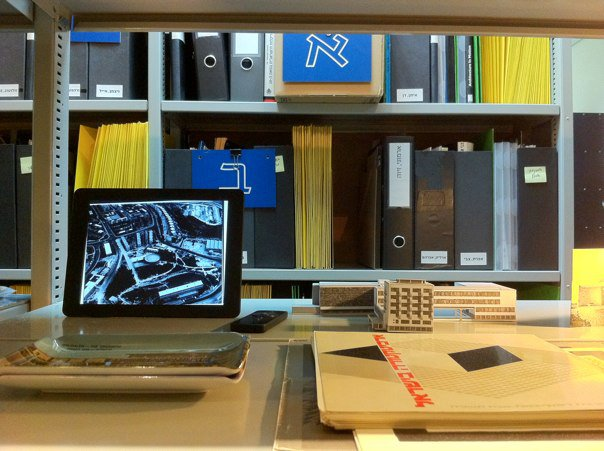 מראה בחלון הראווה של ארכיון אדריכלות ישראל, מגדל שלום מאיר, תל אביב